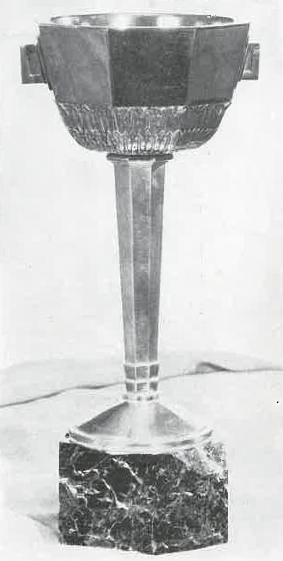 La coupe remise au vainqueur du Championnat de France amateur